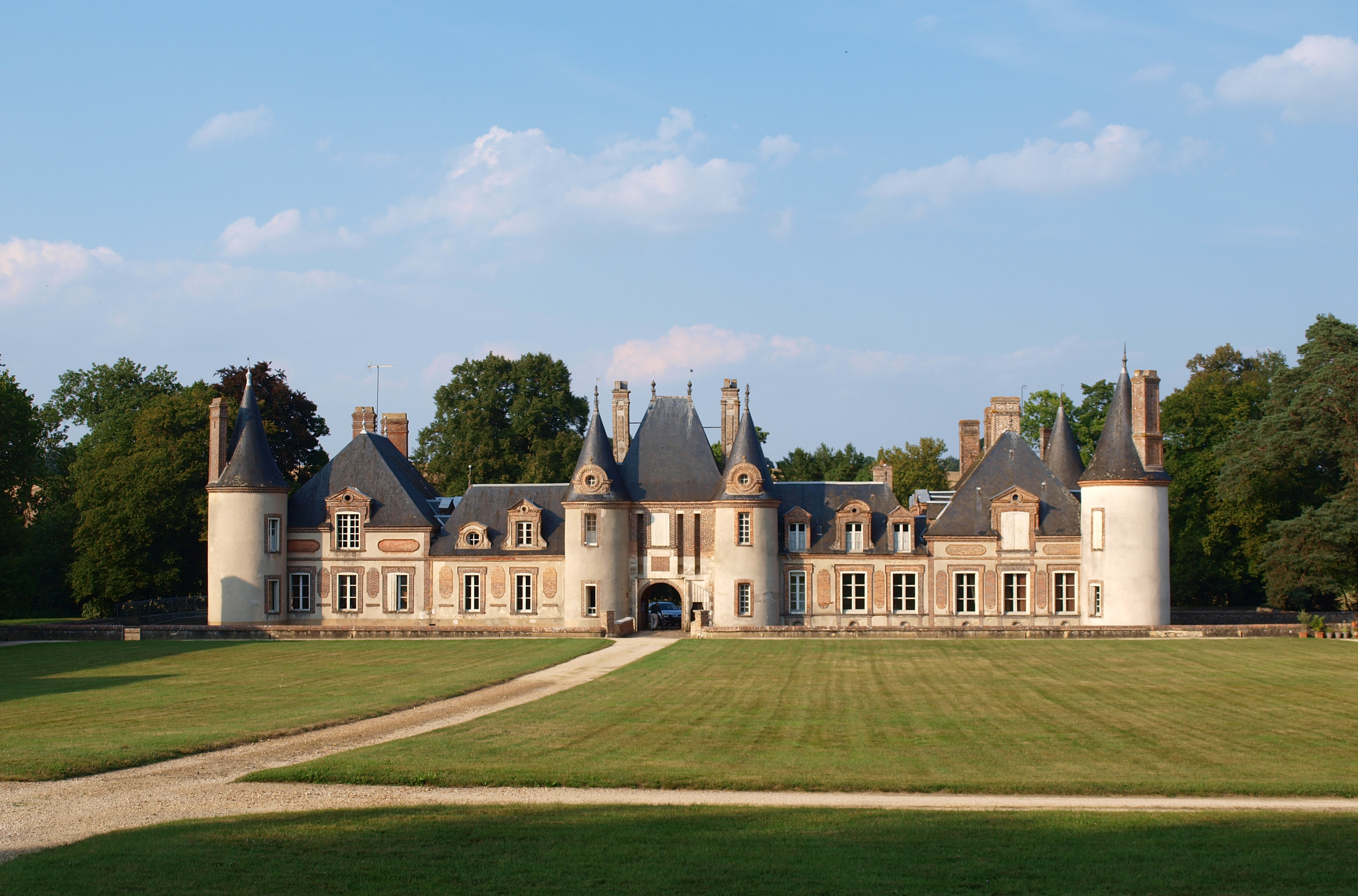 Grandchamp (Yonne, France) ; château